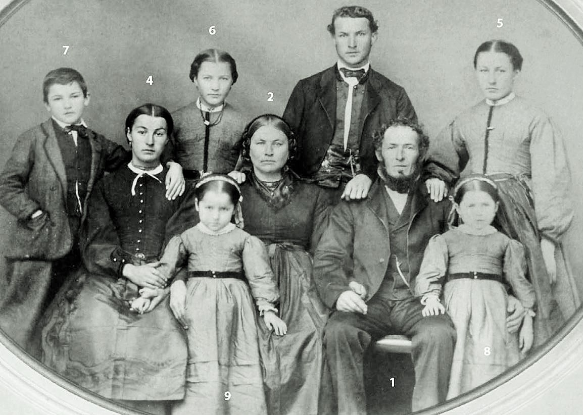 Familie Christian Lötscher, St. Antönien GR, Schweiz, um 1870: Keramik-Dynastie St. Antönien-Ascharina: Fotografie der Familie Christian Lötscher, Hafner (1821–1880) um 1870. Von links nach rechts: Andreas Lötscher d.J. (1857–1933), Barbara (4), Margretha (6), Dorothea (9), Mutter Magdalena Buol, Peter d.J. (1845–1894), Vater Christian Lötscher, Elsbeth (8), Anna (5).